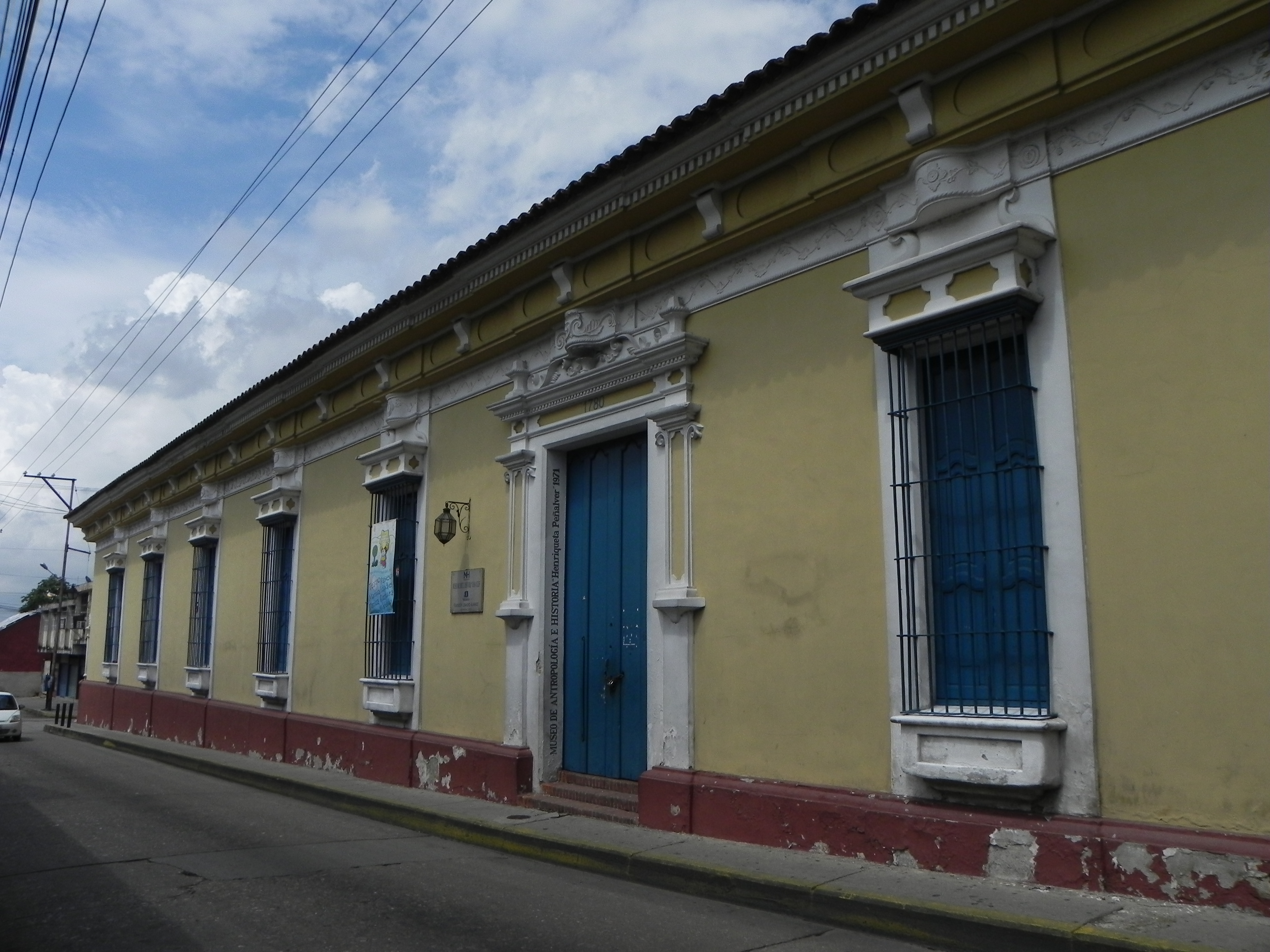 Museo Casa de los Celis, Valencia Venezuela